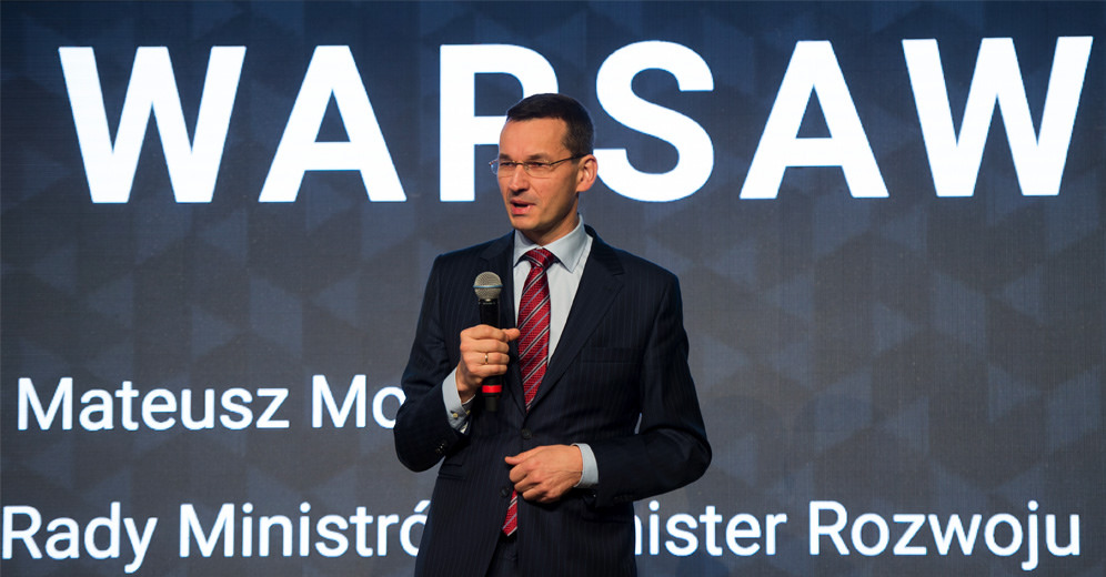 Minister rozwoju Mateusz Morawiecki podczas wystąpienia na otwarciu Campus Warsaw.